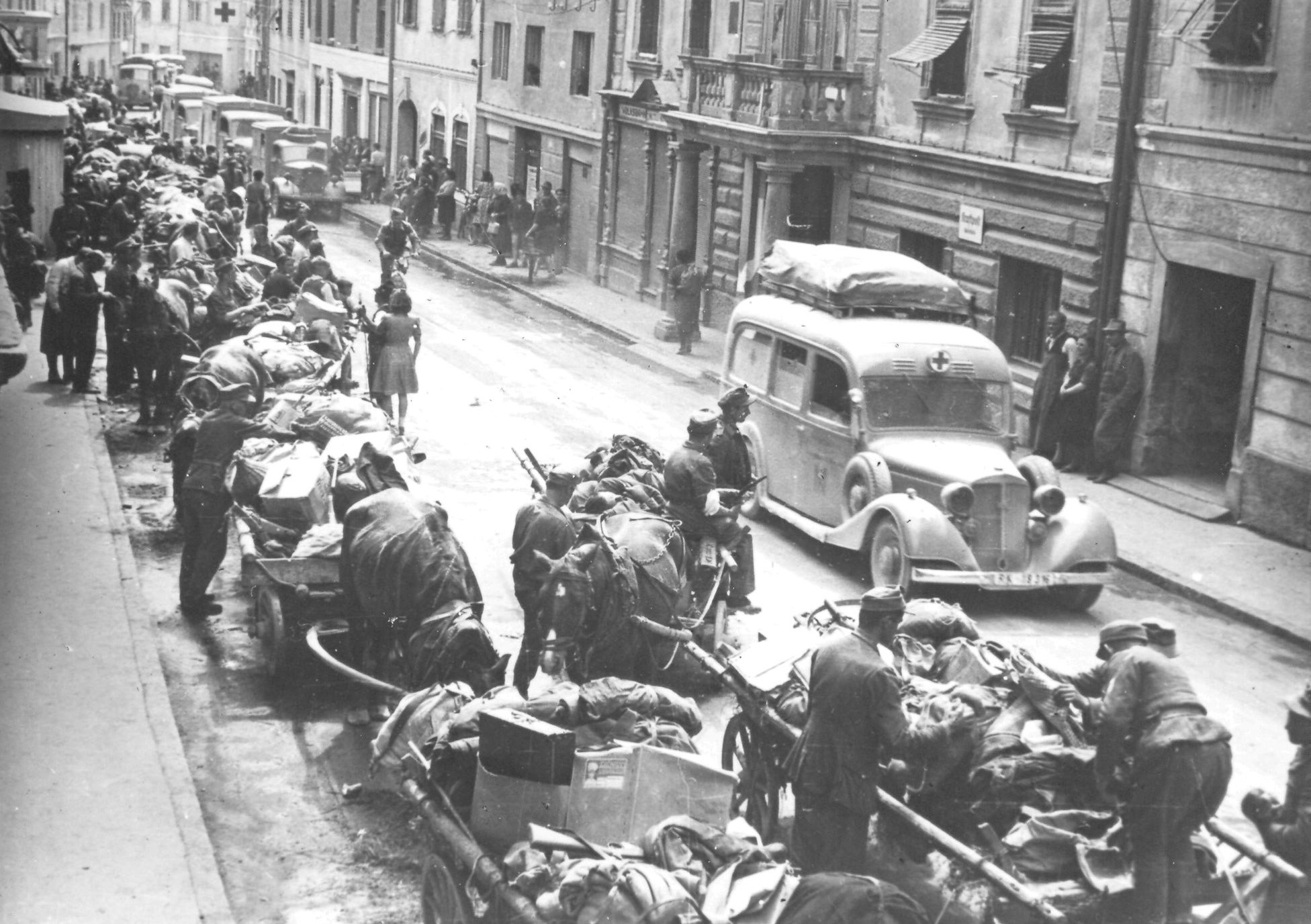 Umik Nemcev in domobrancev skozi Tržič